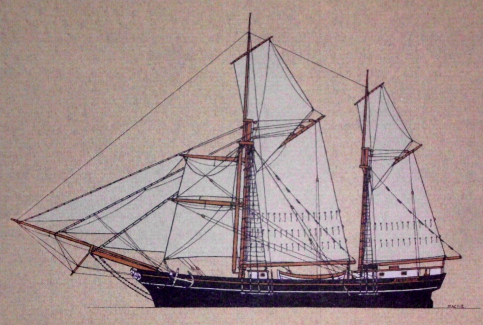 Die Galeasse ist eine Weiterentwicklung der Galeere